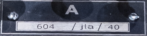 Typenschild einer Enigma-Schlüsselmaschine (identification plate of an Enigma cipher machine)